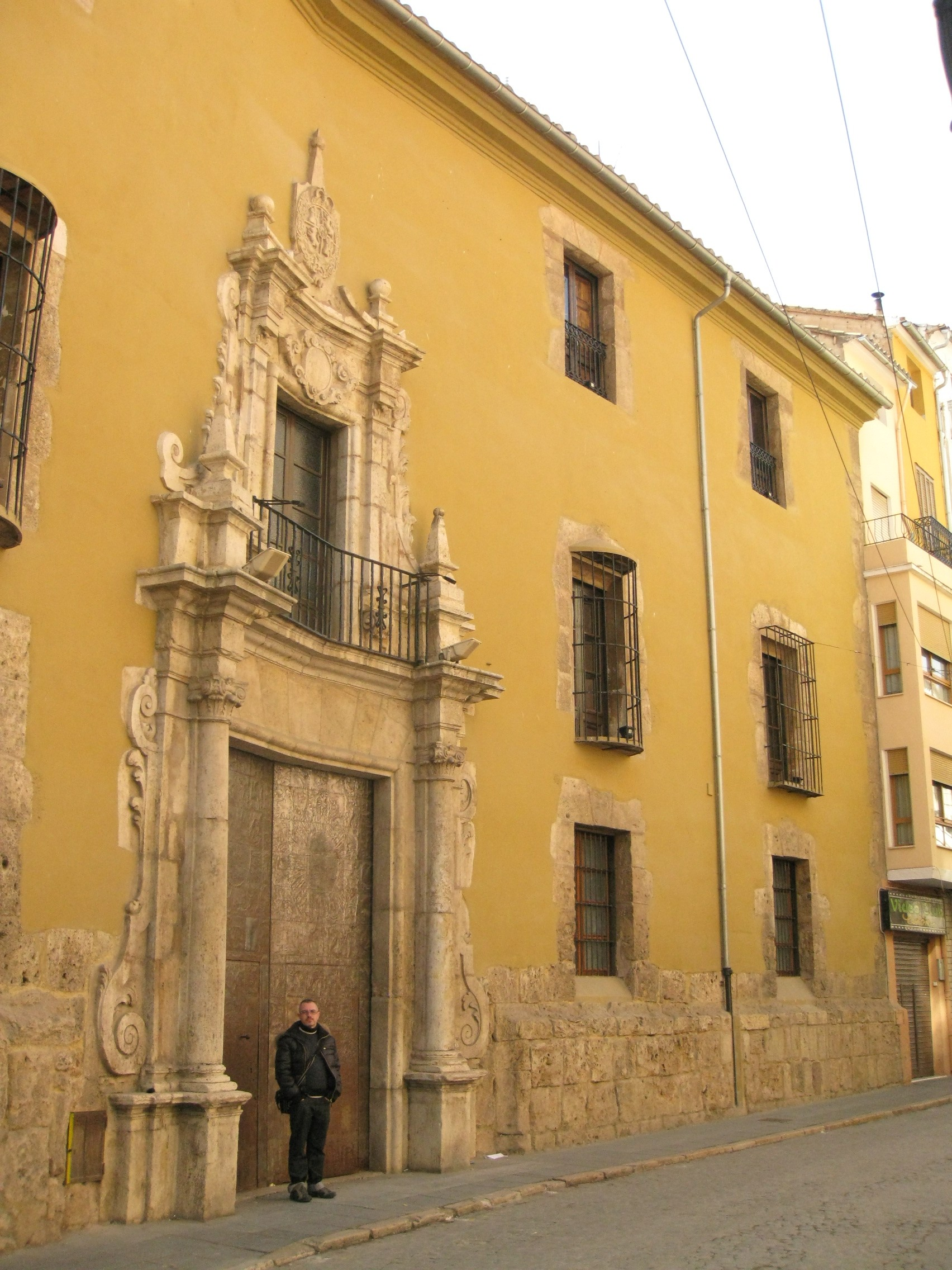 Església del Seminari (Sogorb) 07.104-002.